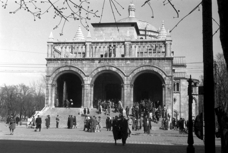 A Regnum Marianum templom a Városligetben Budapesten 1948-ban